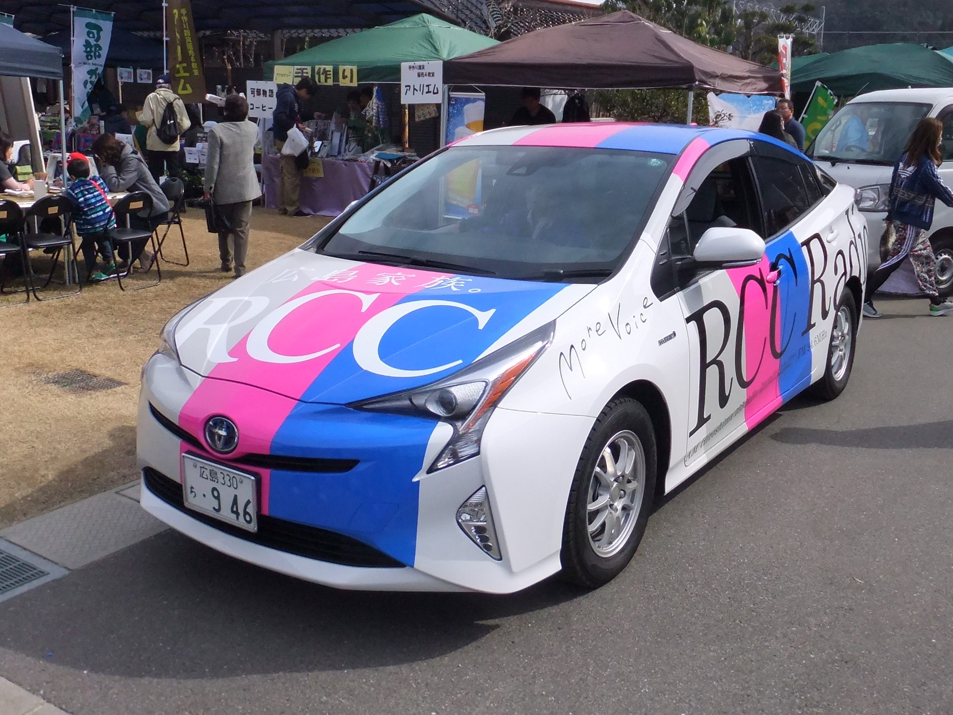 中国放送ラジオカー